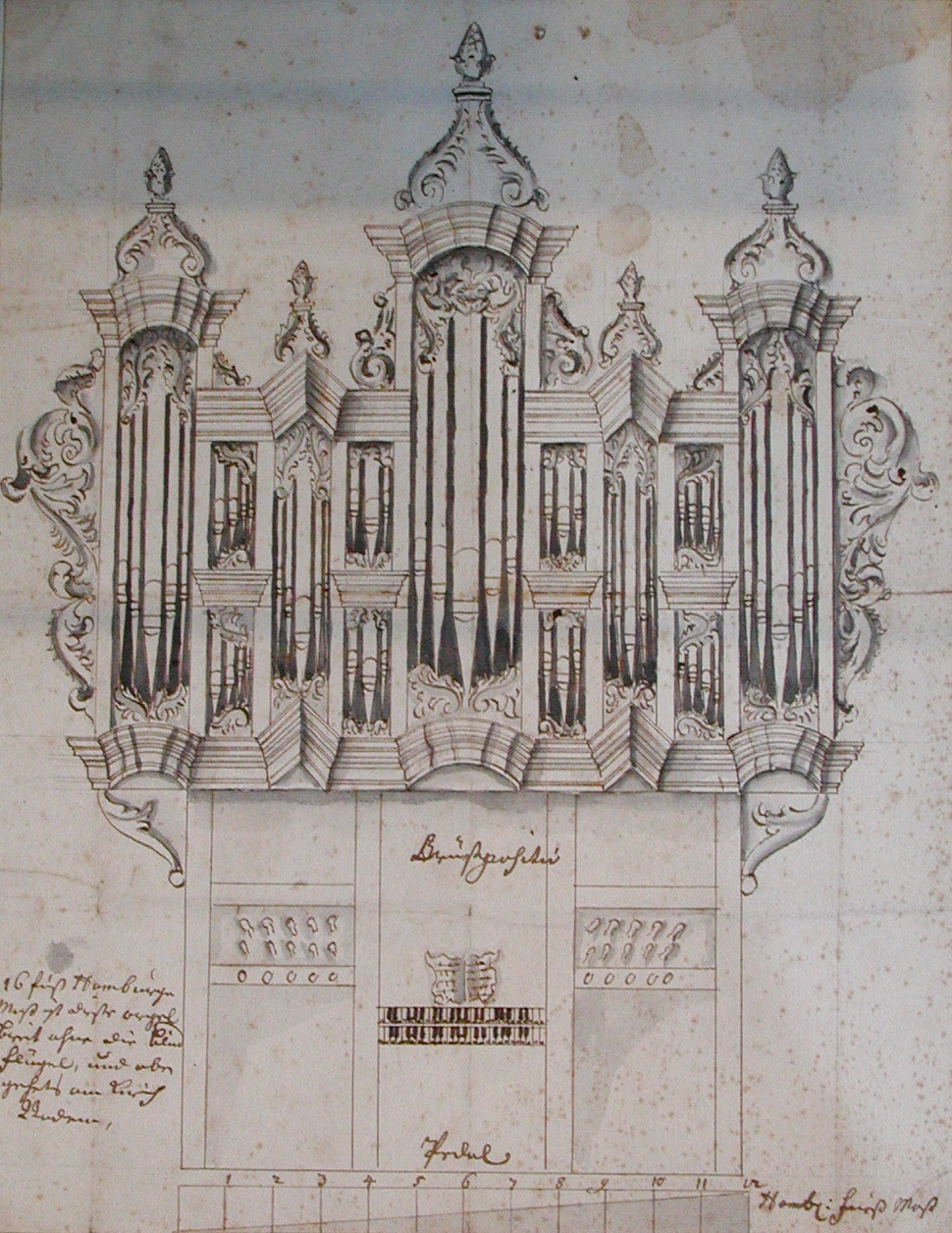 Orgelzeichnung von Arp Schnitger Motiv: Entwurfszeichnung eines Orgelprospektes, ca. 1698 vermutlich für die "Academiekerk" in Groningen angefertigt. Dies ist die einzige Zeichnung, in der Schnitger das von ihm verwendete Maß "Hamburger Fuß" angegeben hat. Foto: Wilfried Wittkowsky, 2005